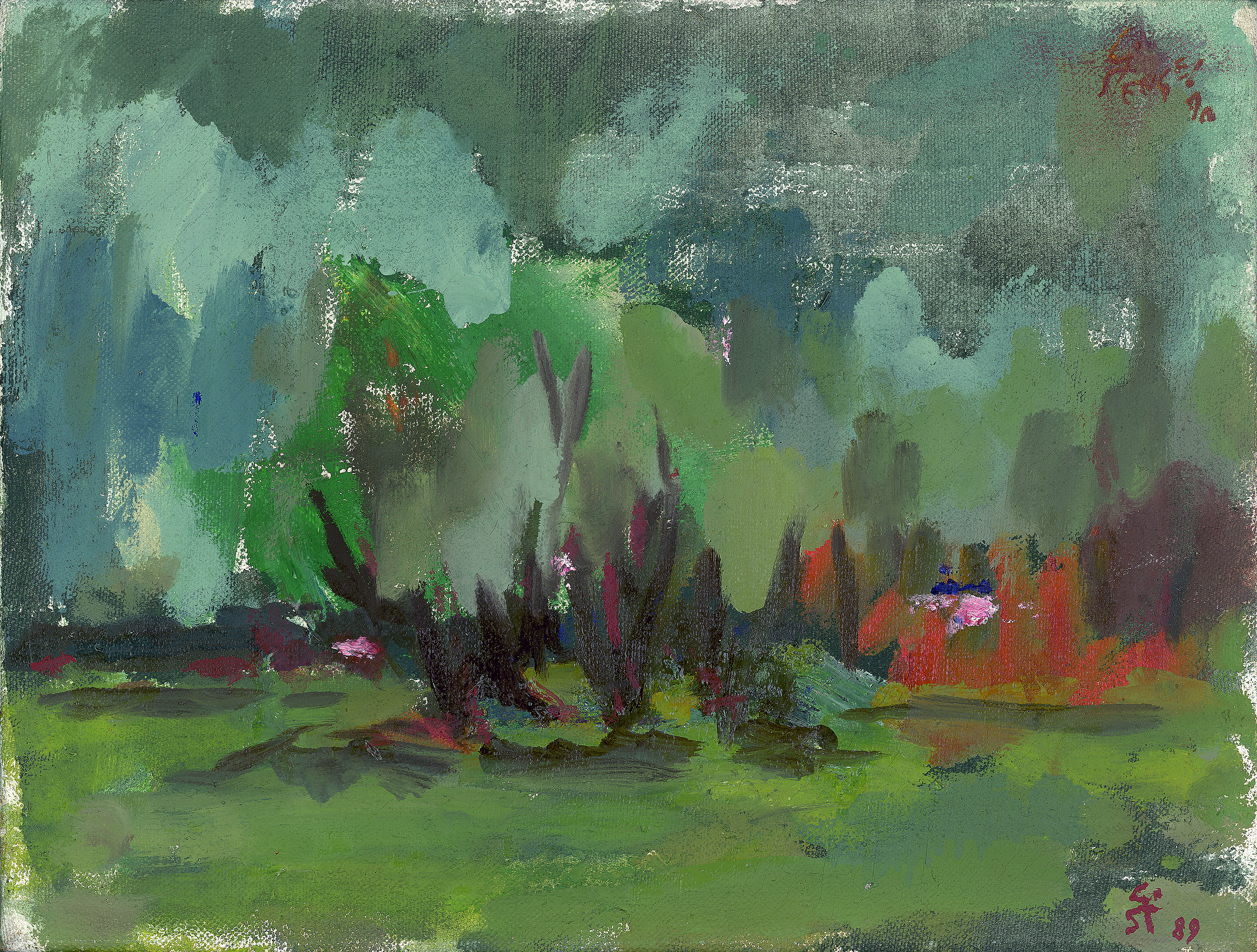 Weiden am Bodden, 38,5 x 29,5, 1989/90